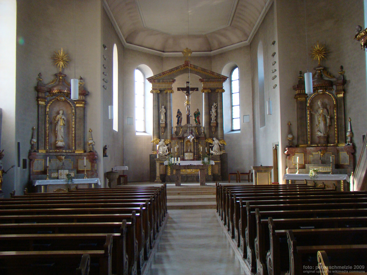 Valentinskirche in Rohrbach am Gießhübel